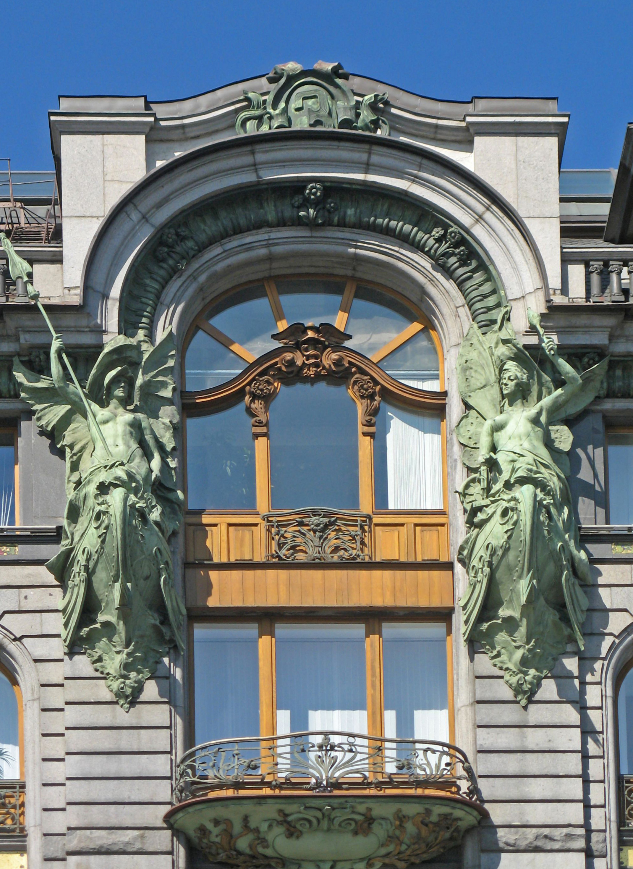 Дом компании Зингер: Невский проспект, 28, набережная канала Грибоедова, 21, Центральный район, Санкт-Петербург